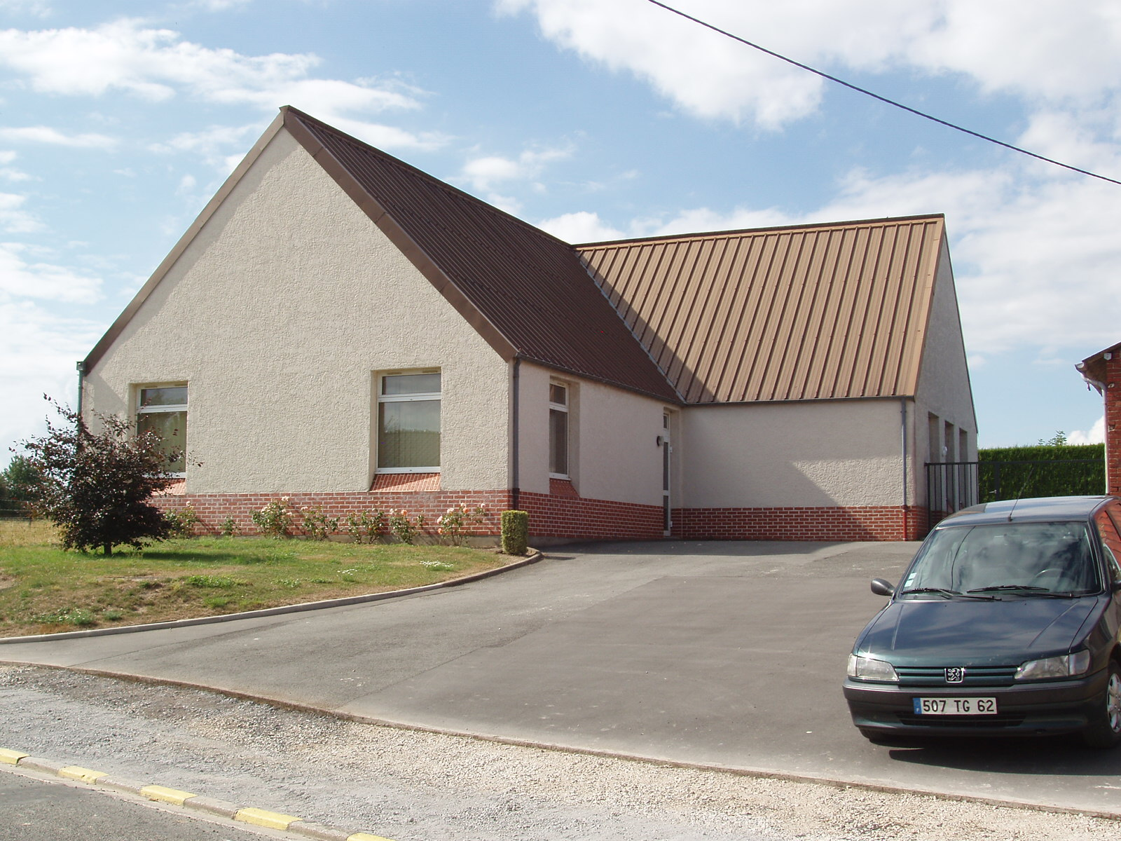 Tilloy-lès-Hermaville dans le département du Pas-de-Calais en France - Salle des Fêtes